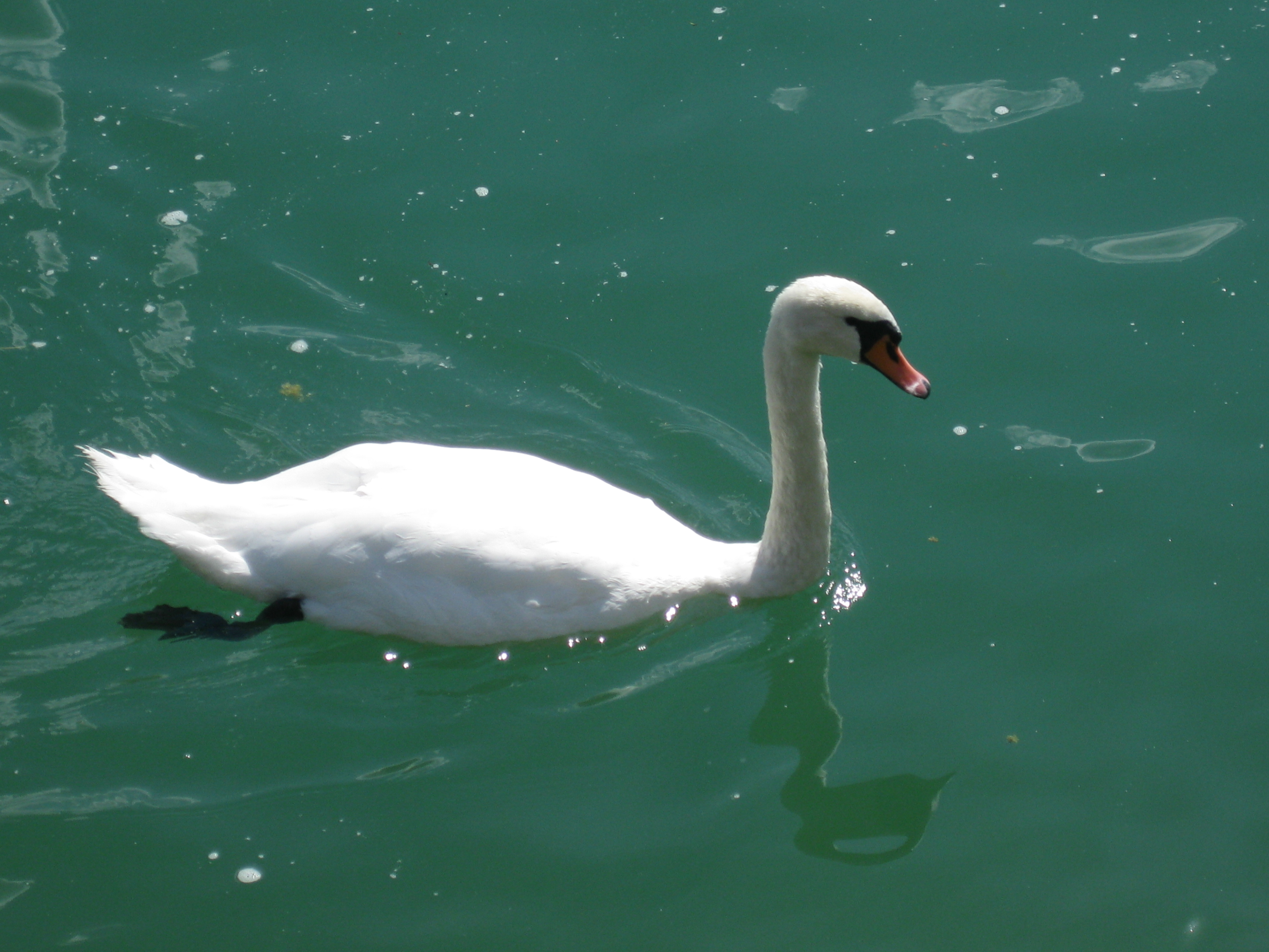 Lumbaart: un cign a purlesa (italia)